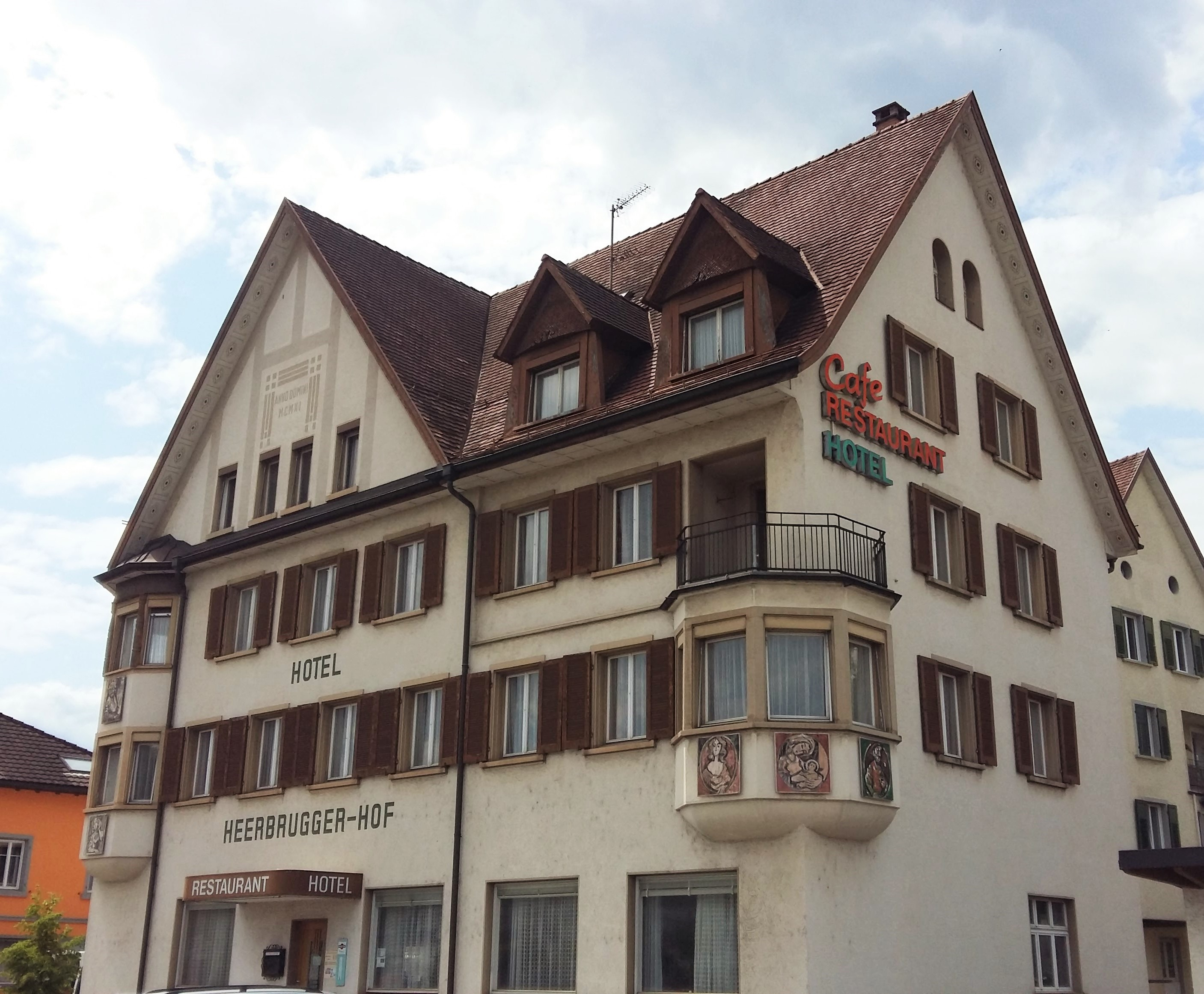 Hotel Heerbruggerhof erbaut von Johan Labonté.